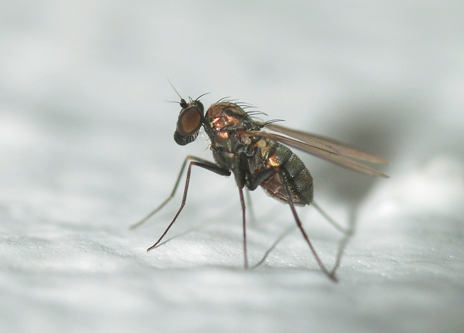 Medetera sp.